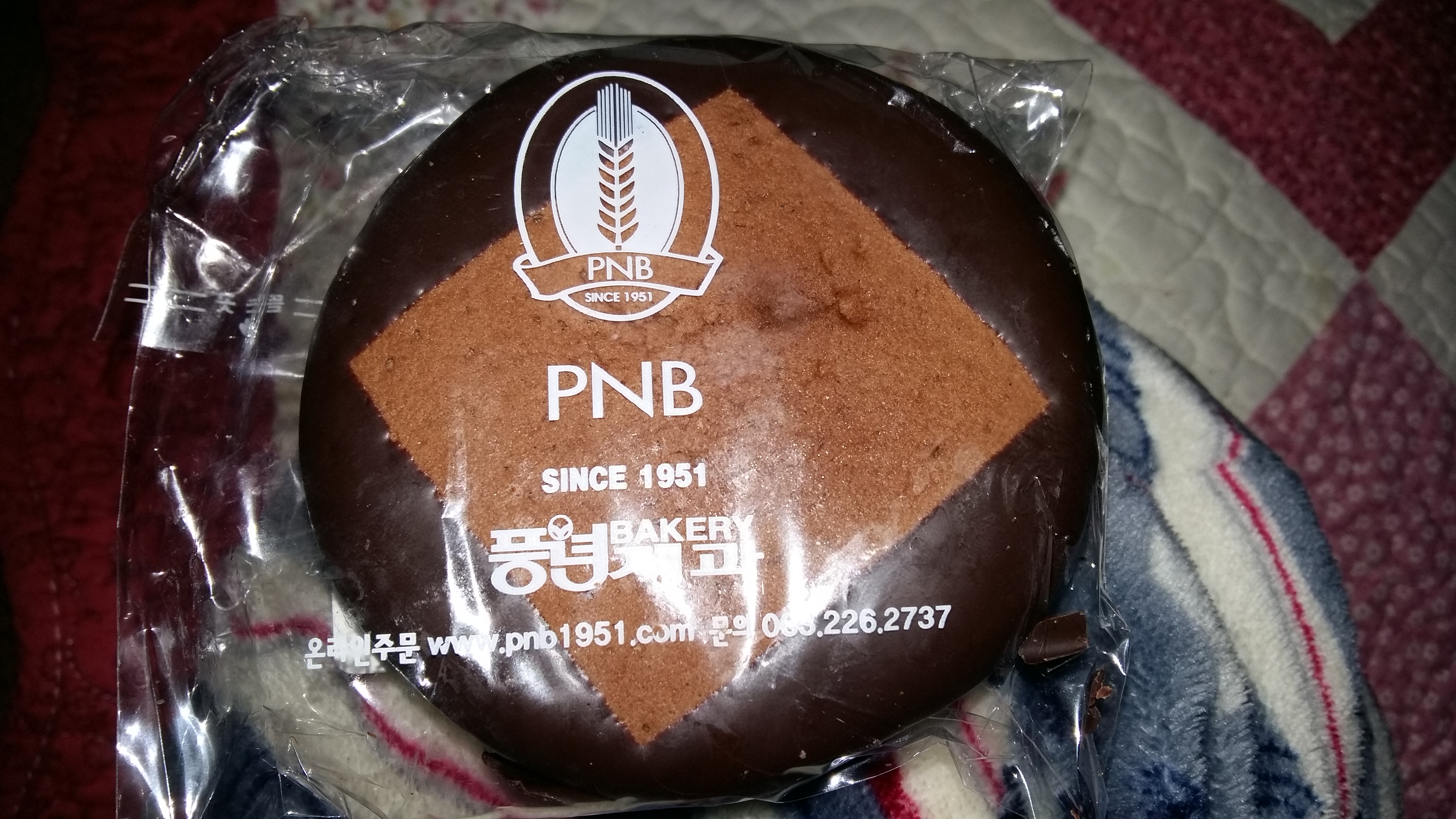 PNB 풍년제과 포장